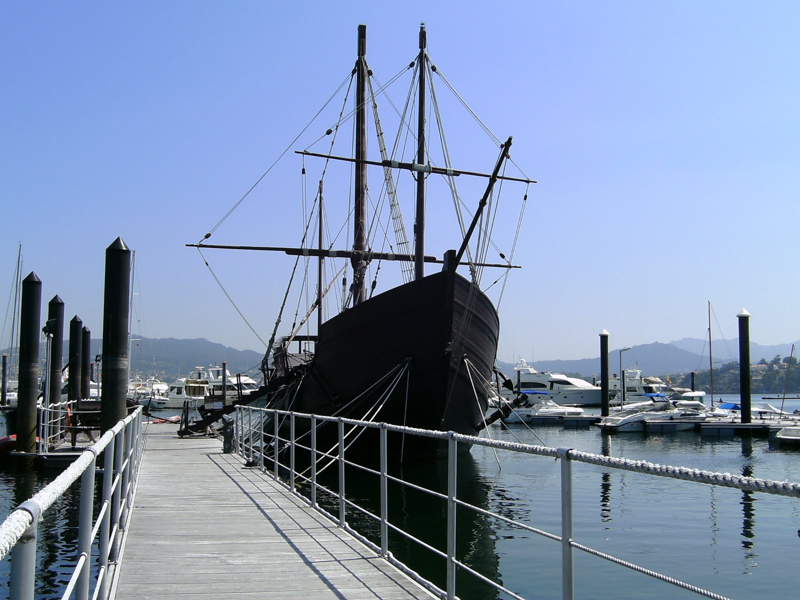 Réplica da Pinta en Baiona.